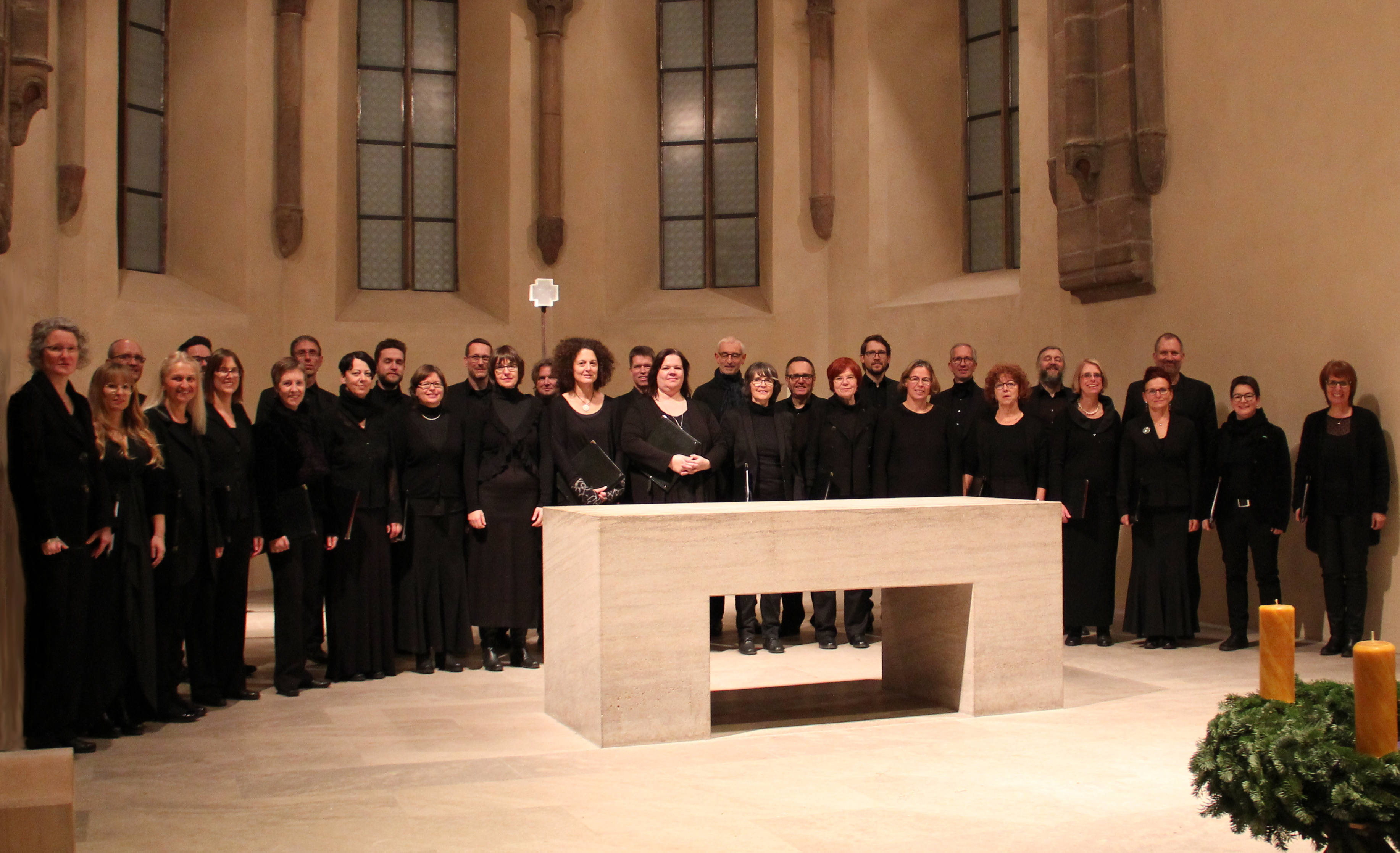 Kammerchor Nürnberg : Konzert in St. Klara, Nürnberg, am 1.12.2019 unter der Leitung von Christian Bischof